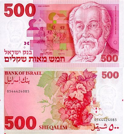 סריקת שטר של 500 שקלים.